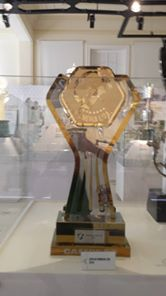 Taça da Primeira Liga do Brasil de 2016 Campeonato Interestadual Sul-Minas-Rio de Janeiro